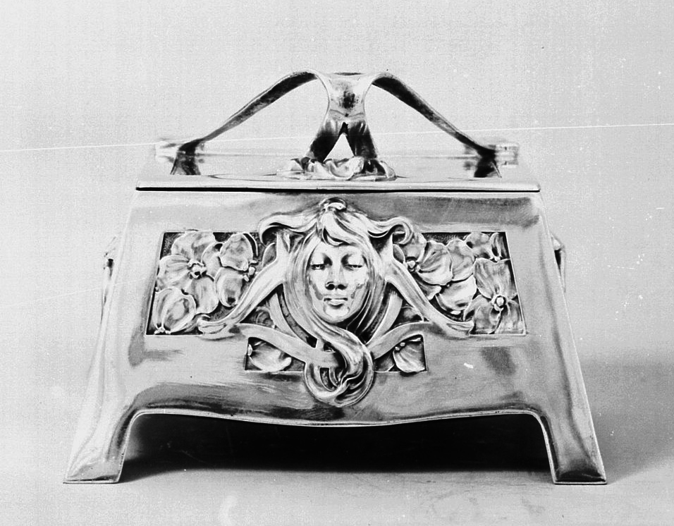 Silberdose der Silberwarenfabrik Peter Bruckmann & Söhne (Heilbronn) im Kunstgewerbemuseum Köln, Aufnahme um 1900